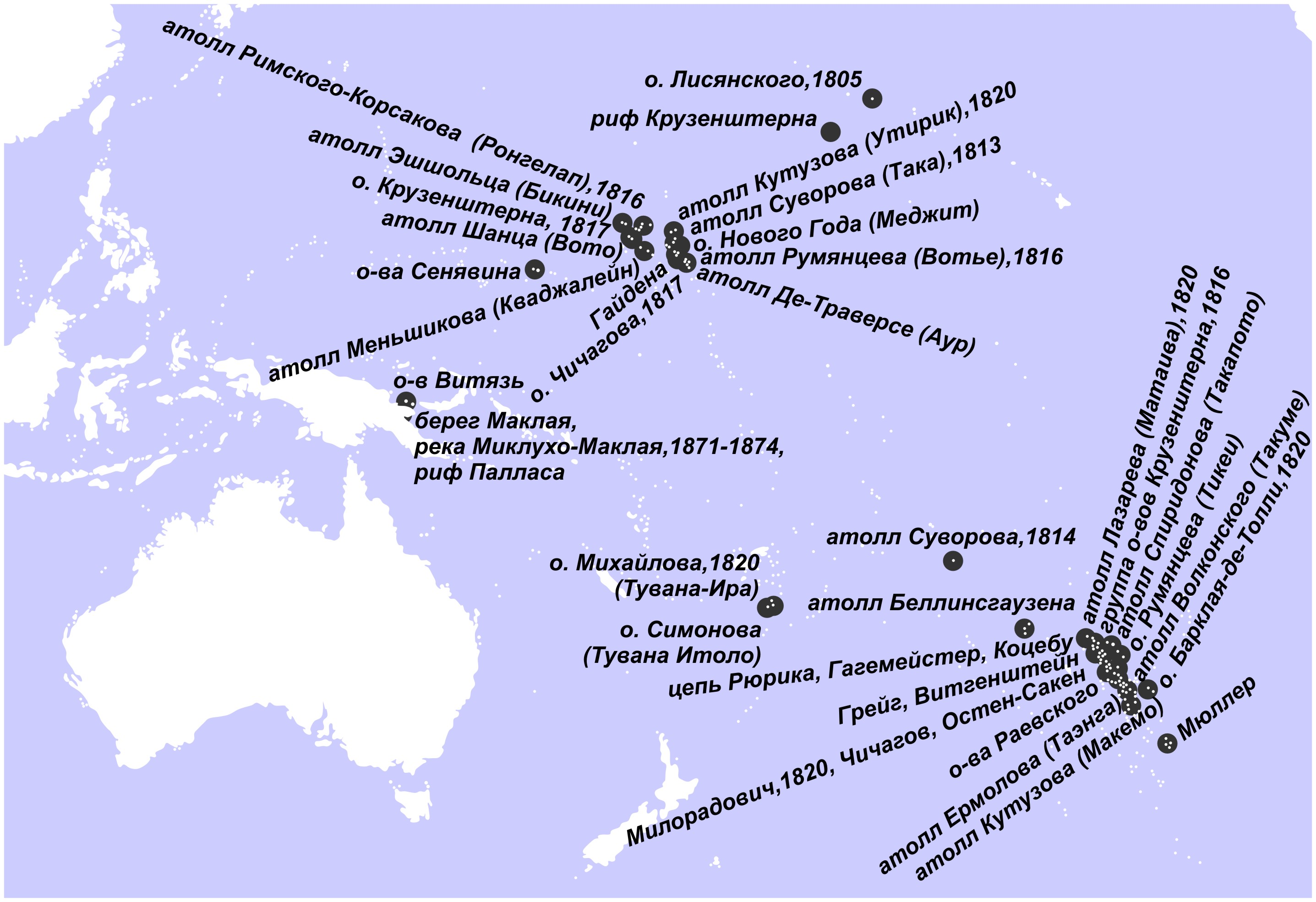 Карта «Имена русских людей на карте тропической части Тихого океана» (для статьи Океания). Источник: Литвинов Н.Н. Стратегический менеджмент на примере Азиатско-Тихоокеанского региона. Монография. — М., 2010. — 200 [10] с. — (Strategic Management in the Asian-Pacific) - ISBN 978-5-91252-029-7